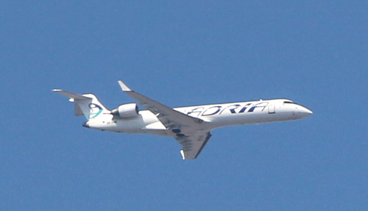 CRJ700 of now defunct Adria Airways on approach to VIE airport, May 2018.